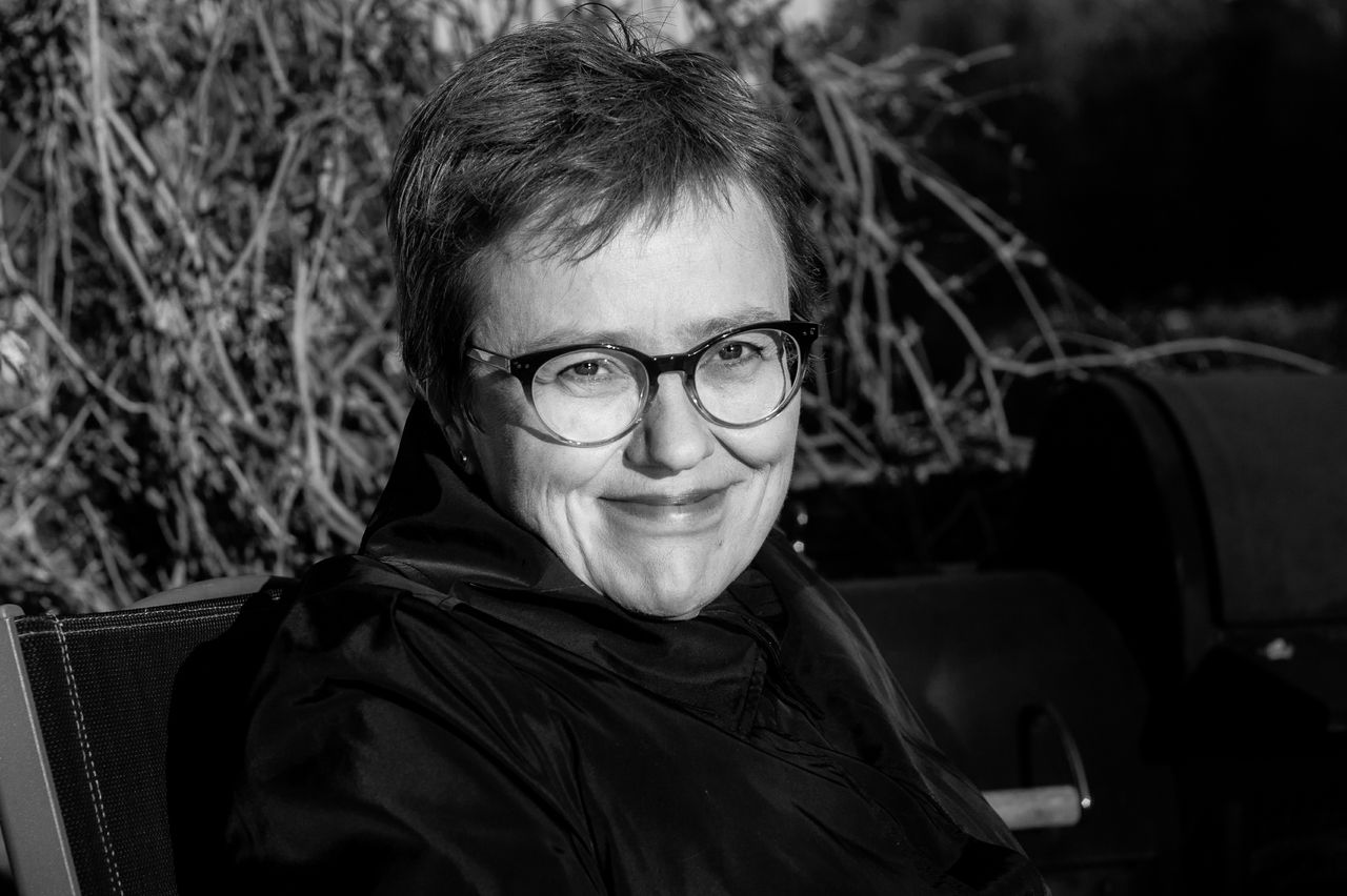 TLÜ professor